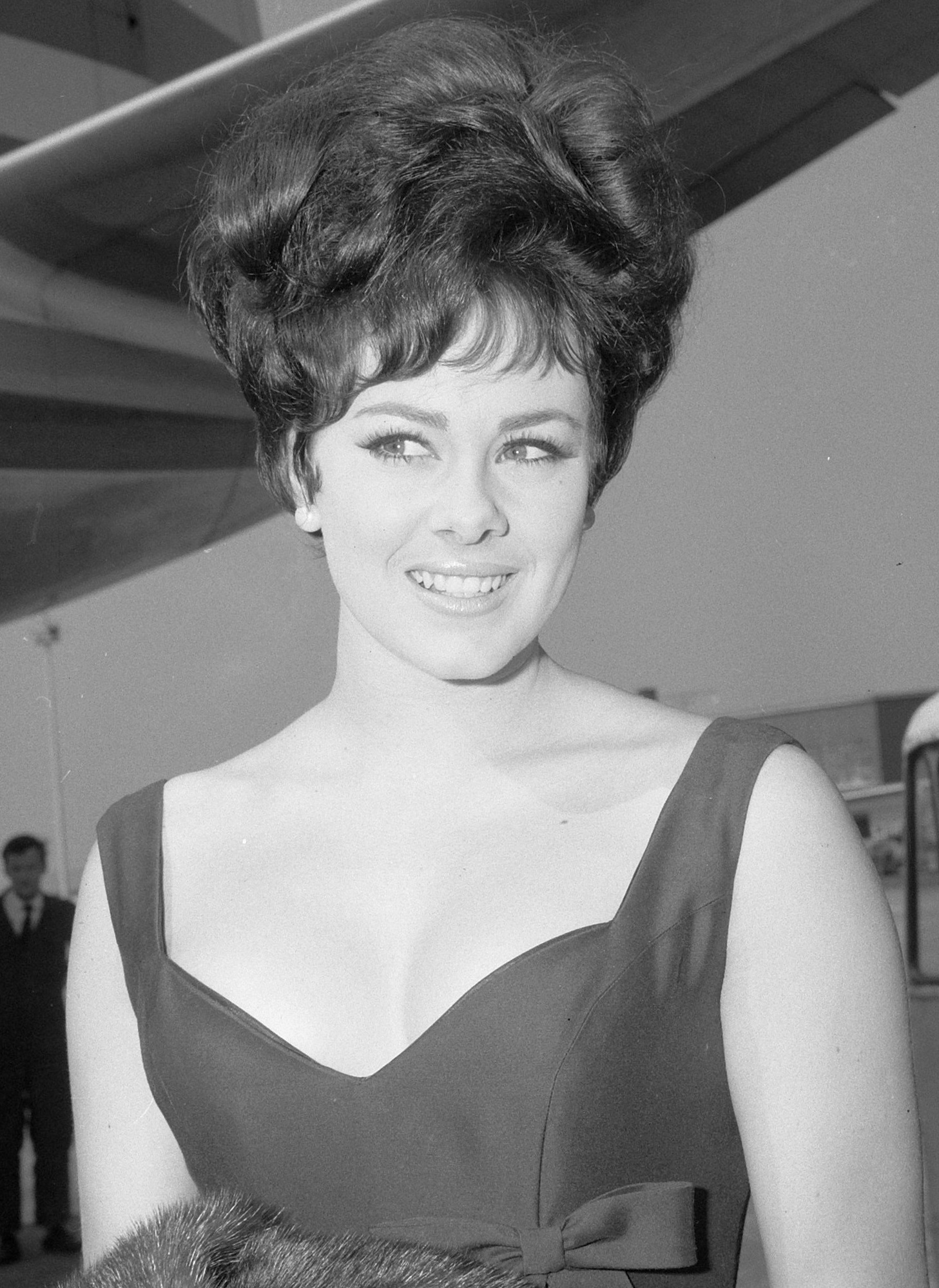 Miss World Ann Sidney bij aankomst op Schiphol in verband met de Engelse week